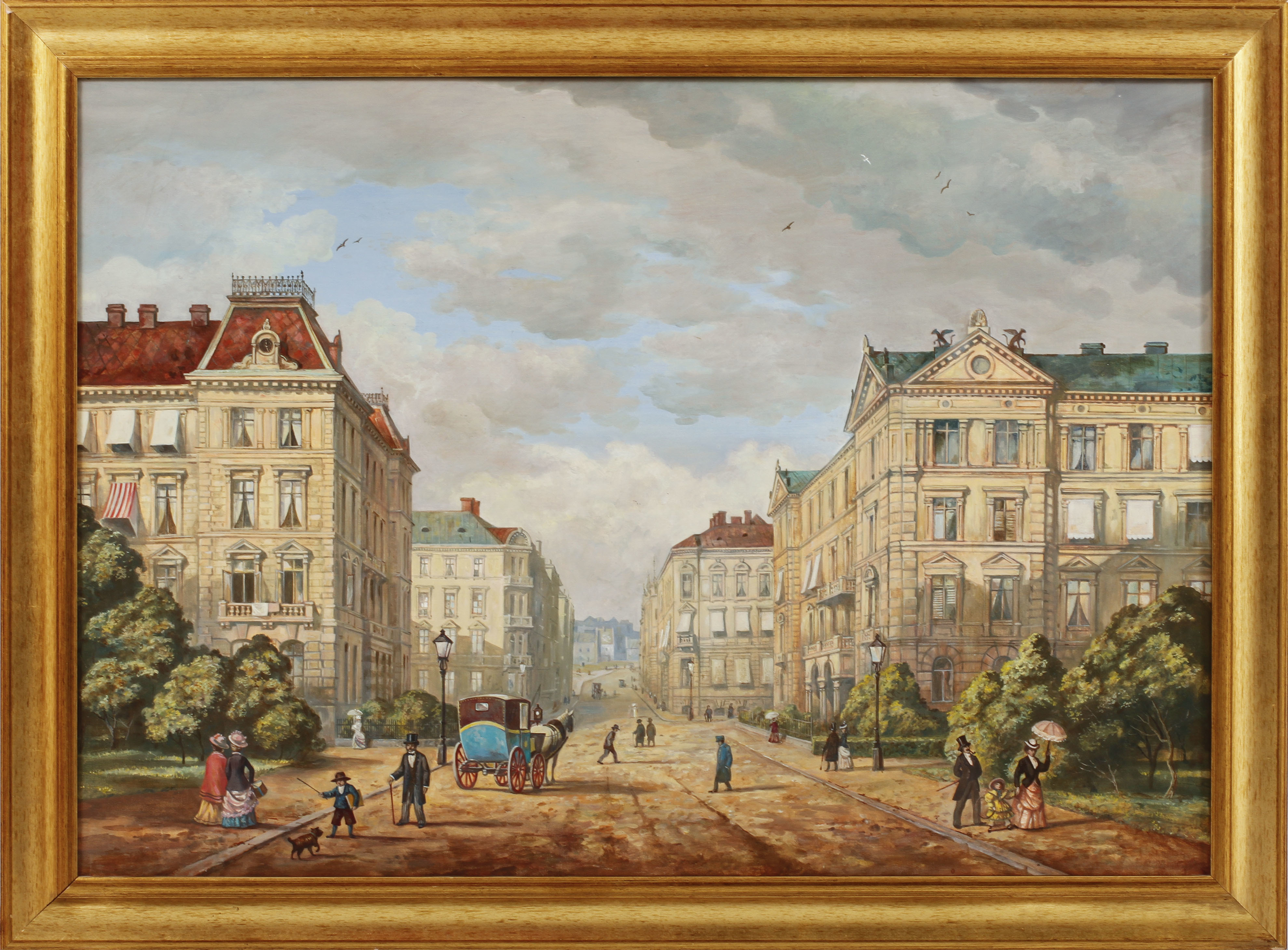 Viktoriagatan i Göteborg. Vy norrut från korsningen med Thorildsgatan.